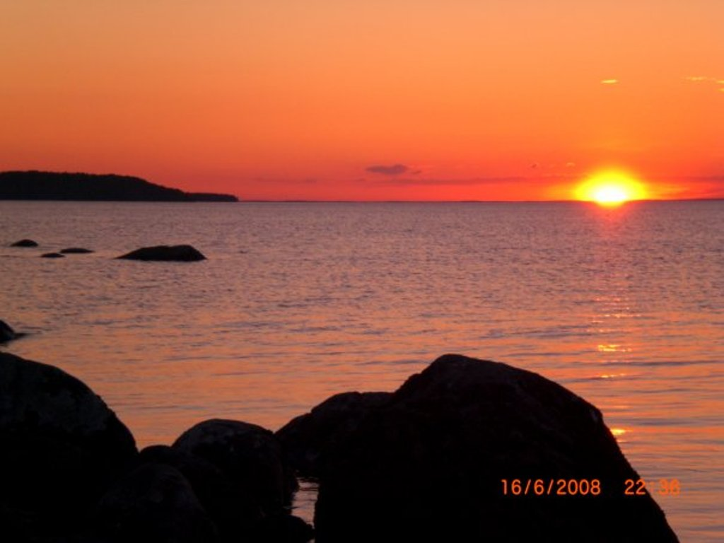 Lake Syamozero at Essoyla/Jessoila